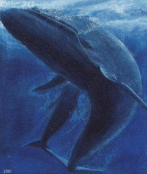 Balaenoptera musculus